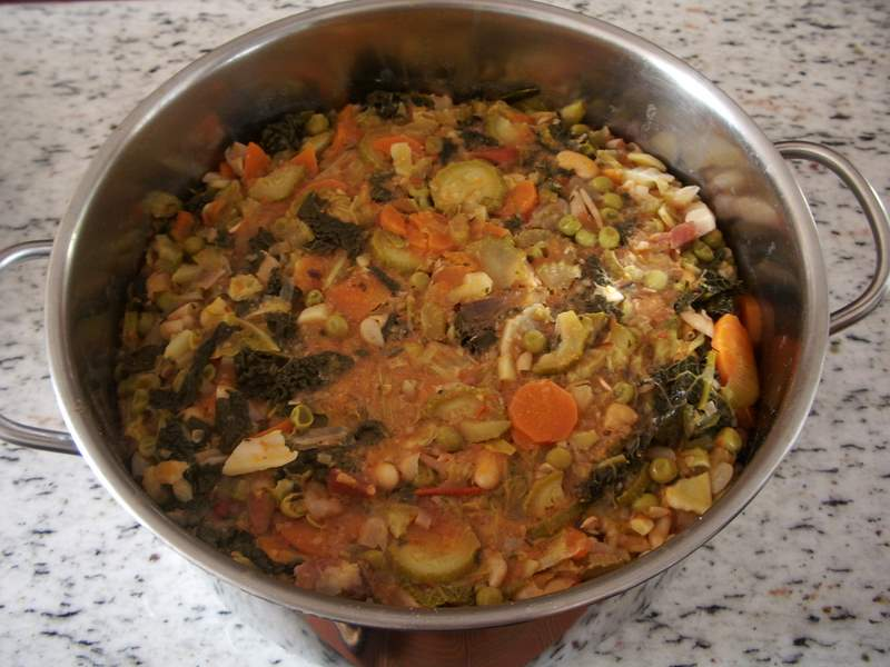 Pentola contenente la minestra di pane, successivamente riscaldata si sbricilerà e prenderà il nome di ribollita